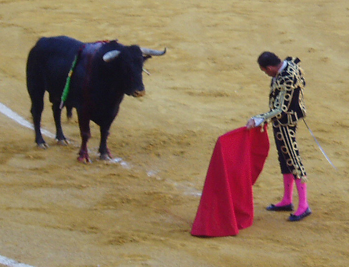 El diestro Pepín Liria en la corrida goyesca de 2008 de El Puerto de Santa María.